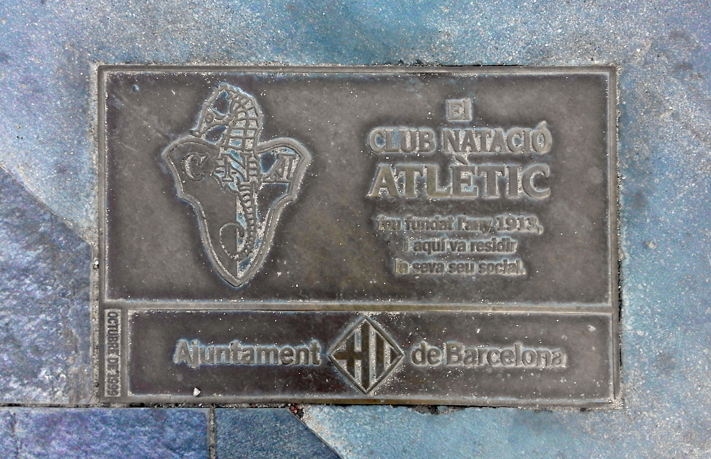 Club Natació Atlètic. C. Pontevedra amb platja de Sant Miquel (Barcelona)